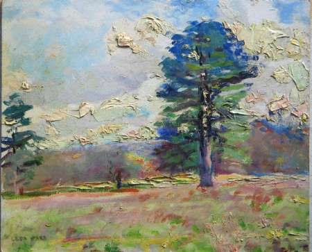 Cèdre et effet de ciel